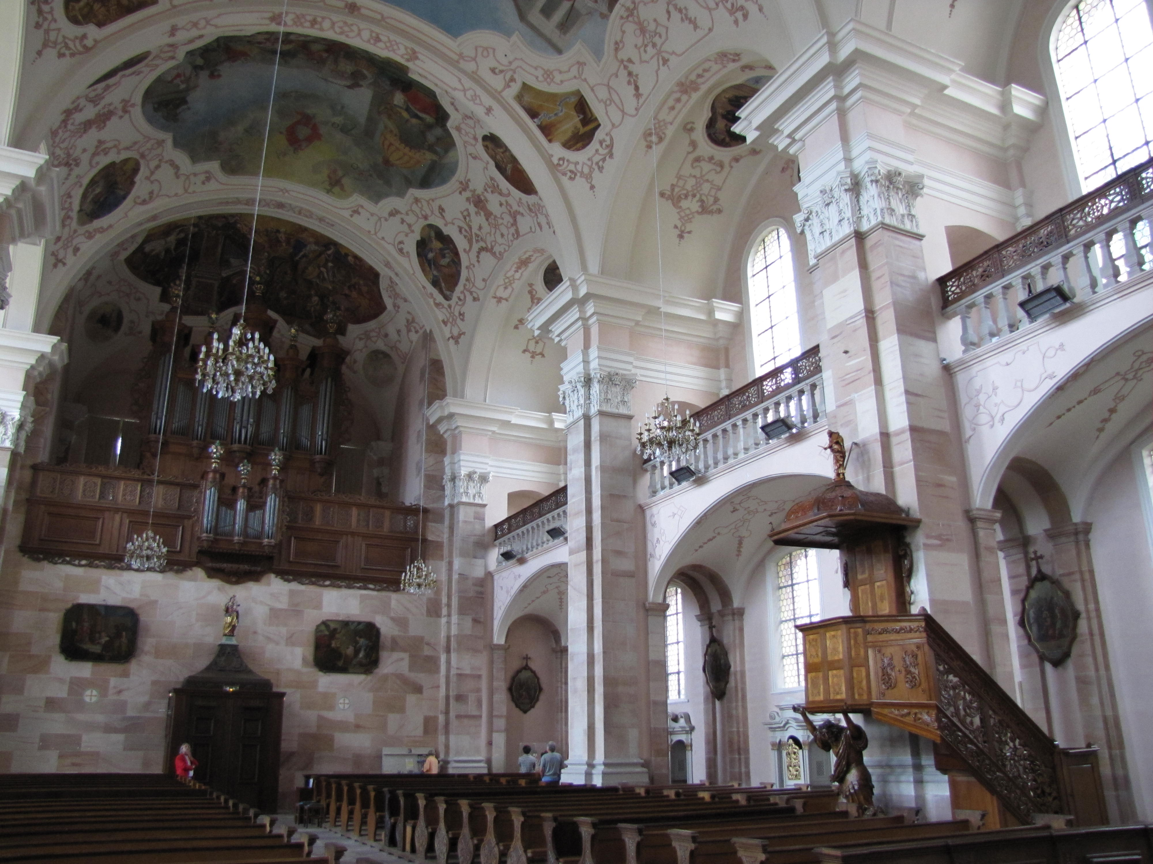 Alsace, Bas-Rhin, Église abbatiale Saint-Maurice d'Ebersmunster (PA00084701, IA00124485). Vue intérieure vers la tribune d'orgue.